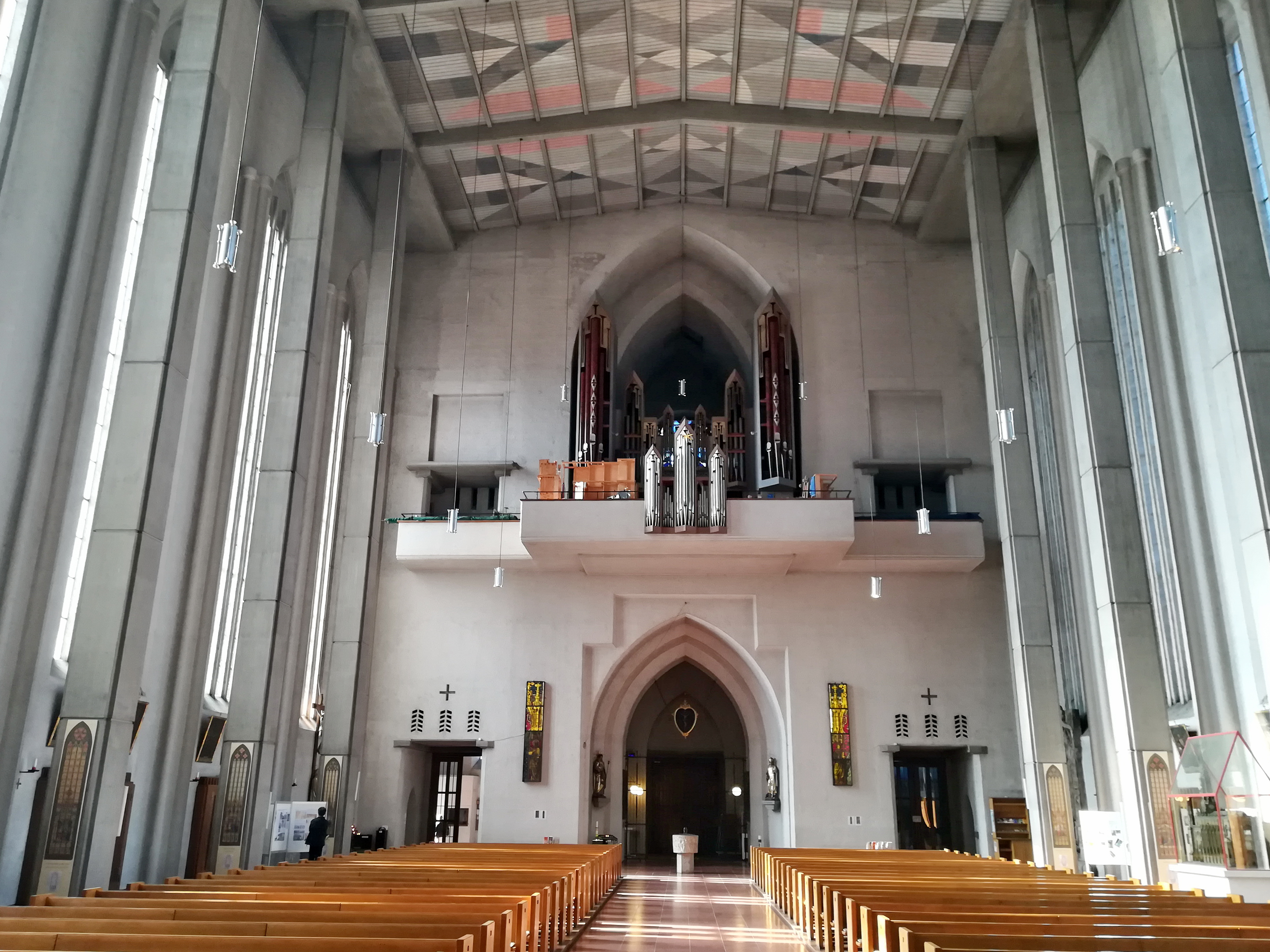 Die katholische Pfarrkirche Maria Hilf in der Au, genannt Mariahilfkirche, ist die Hauptpfarrkirche der Au.